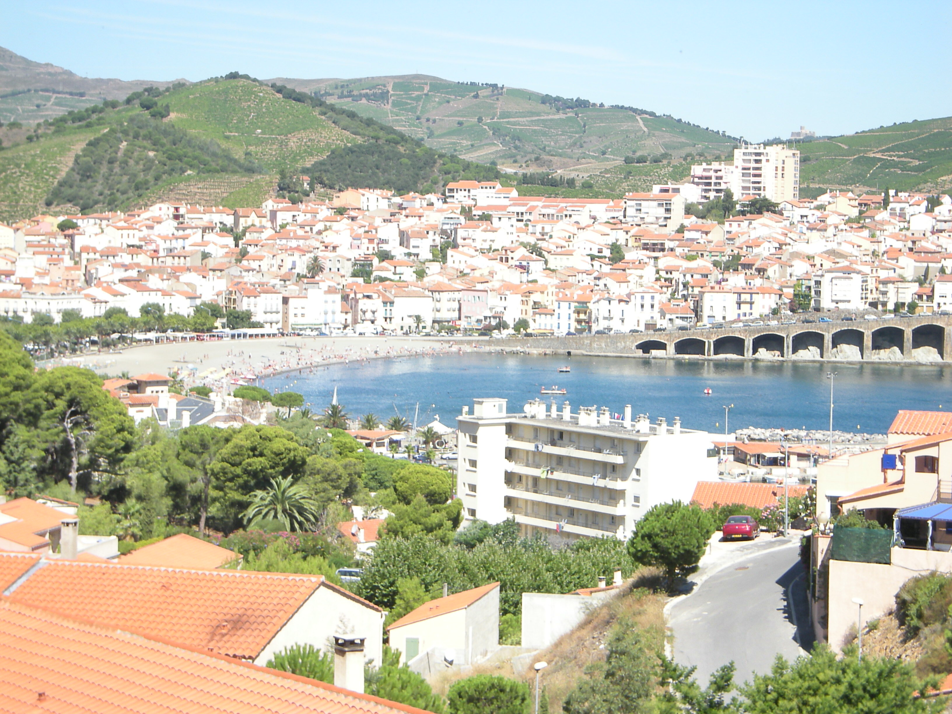 banyuls sur mer